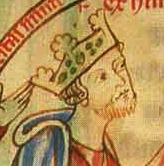 Jindřich II. Plantagenet